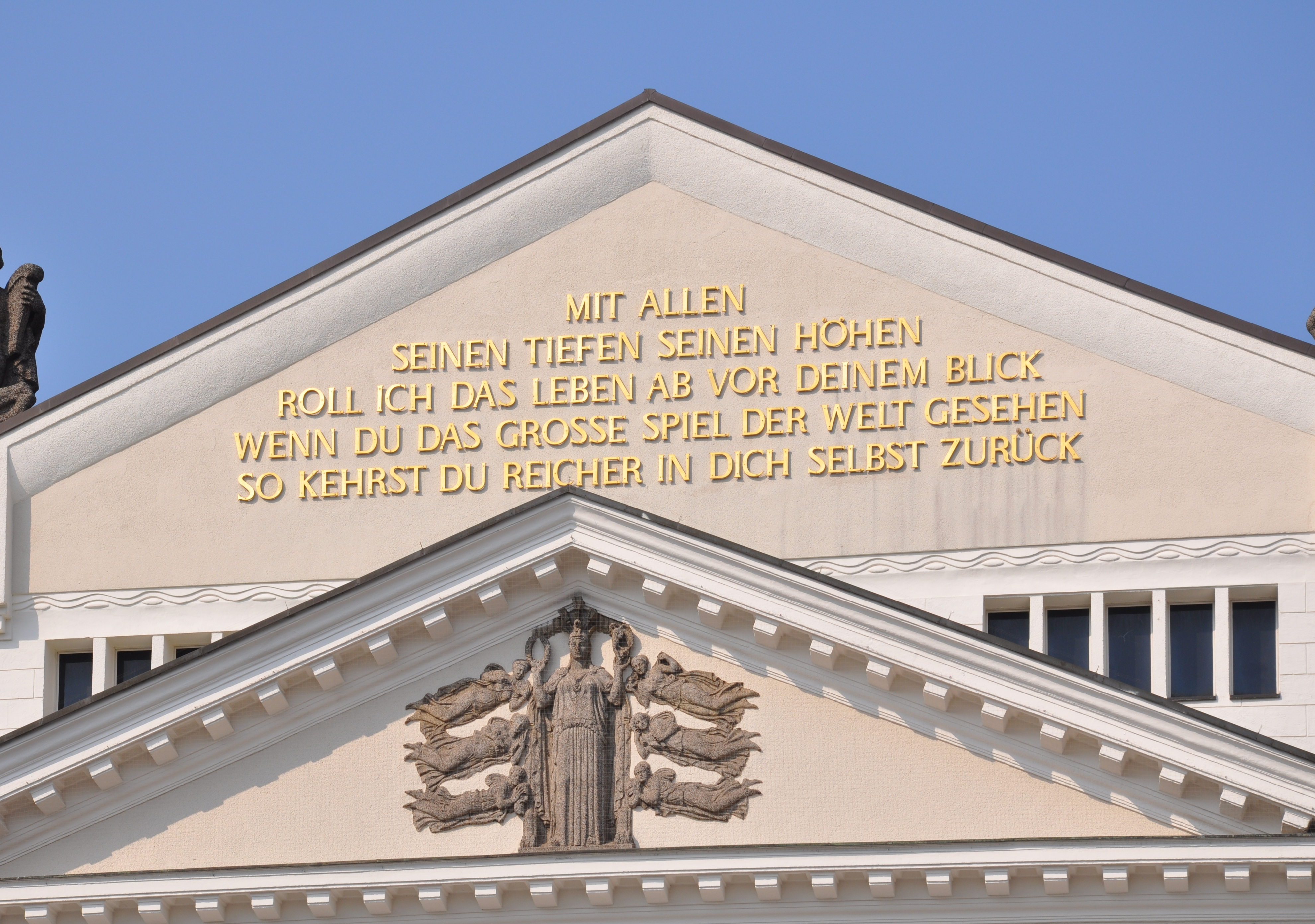 Theater Duisburg, Giebelfelder